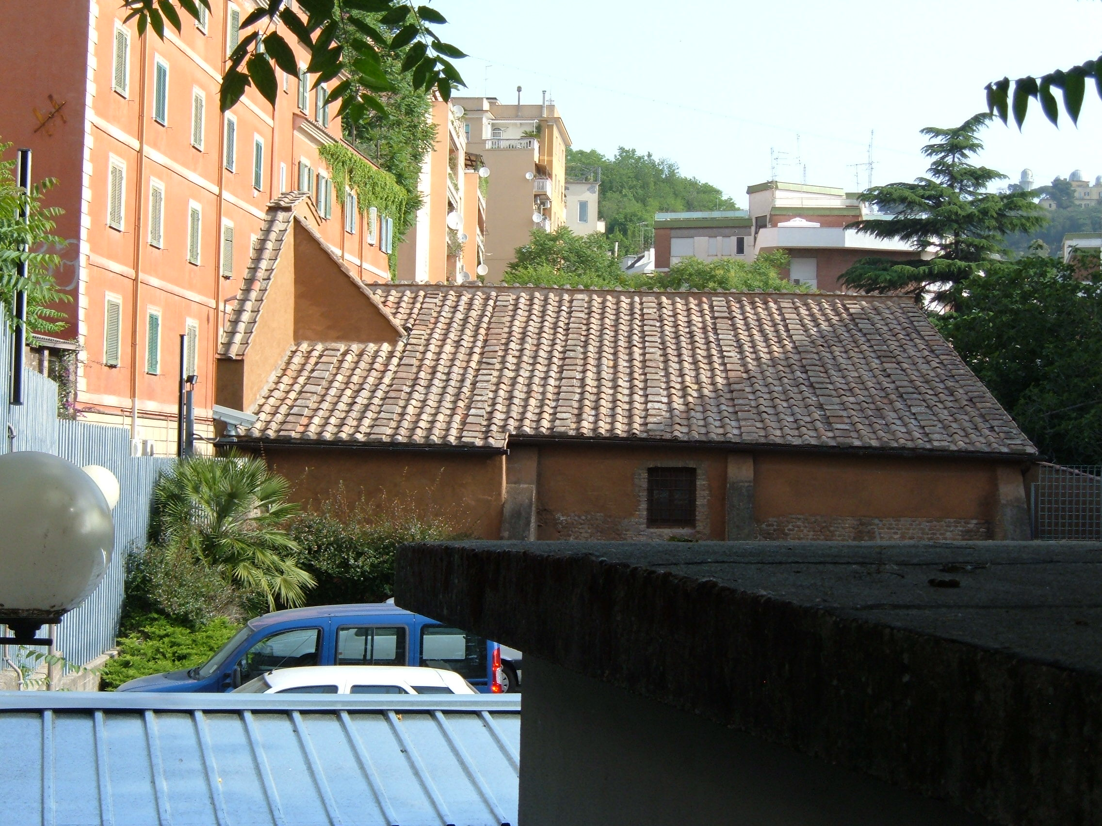 Chiesa di San Lazzaro (XII secolo), a Roma, nel quartiere Della Vittoria.